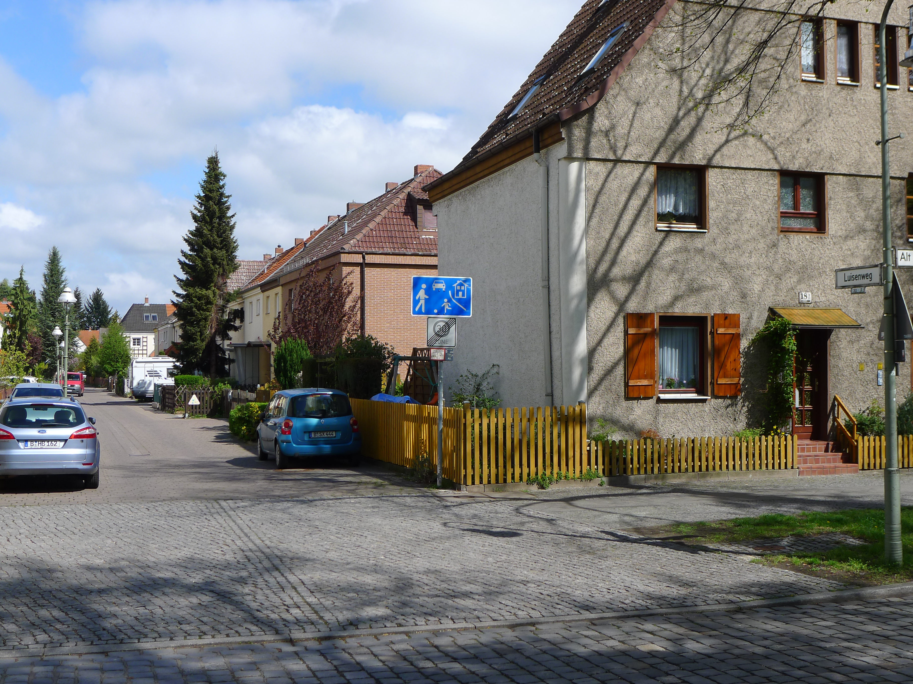 Straßenpanorama